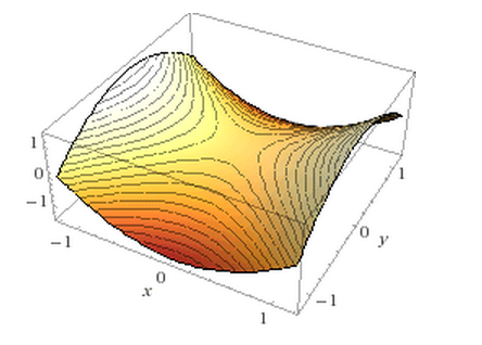 Courbe correspondant à un point col